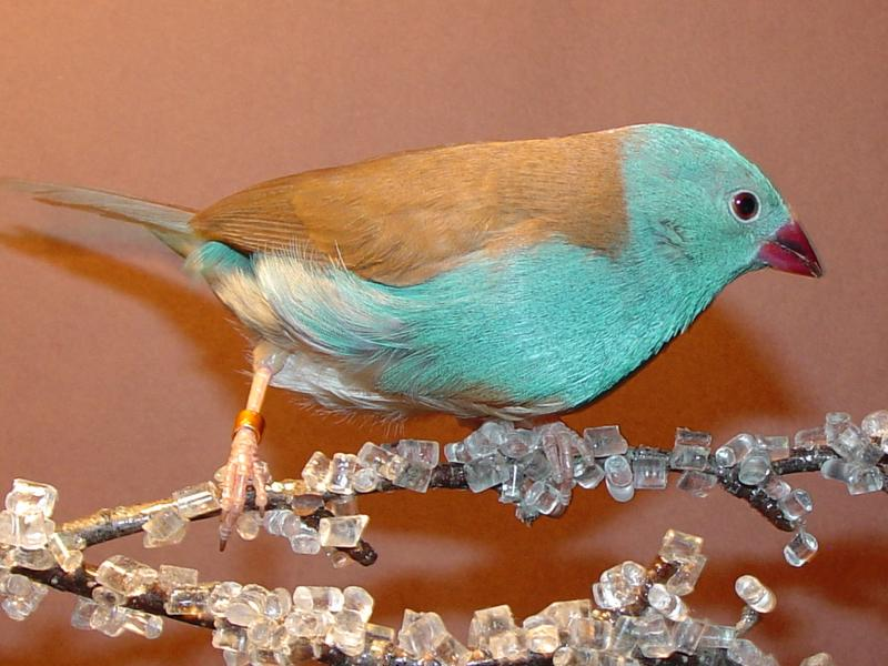 Blue-capped Cordon-bleu Finch